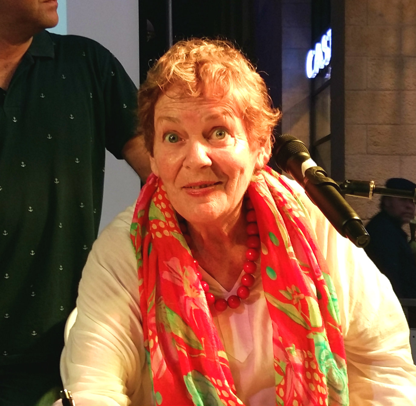 האמנית שרה'לה שרון בעת הופעה בירושלים